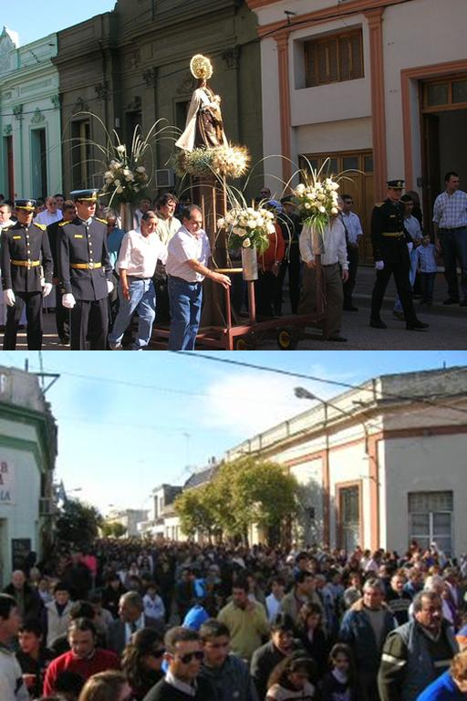 Procesión 16 de Julio de 2009